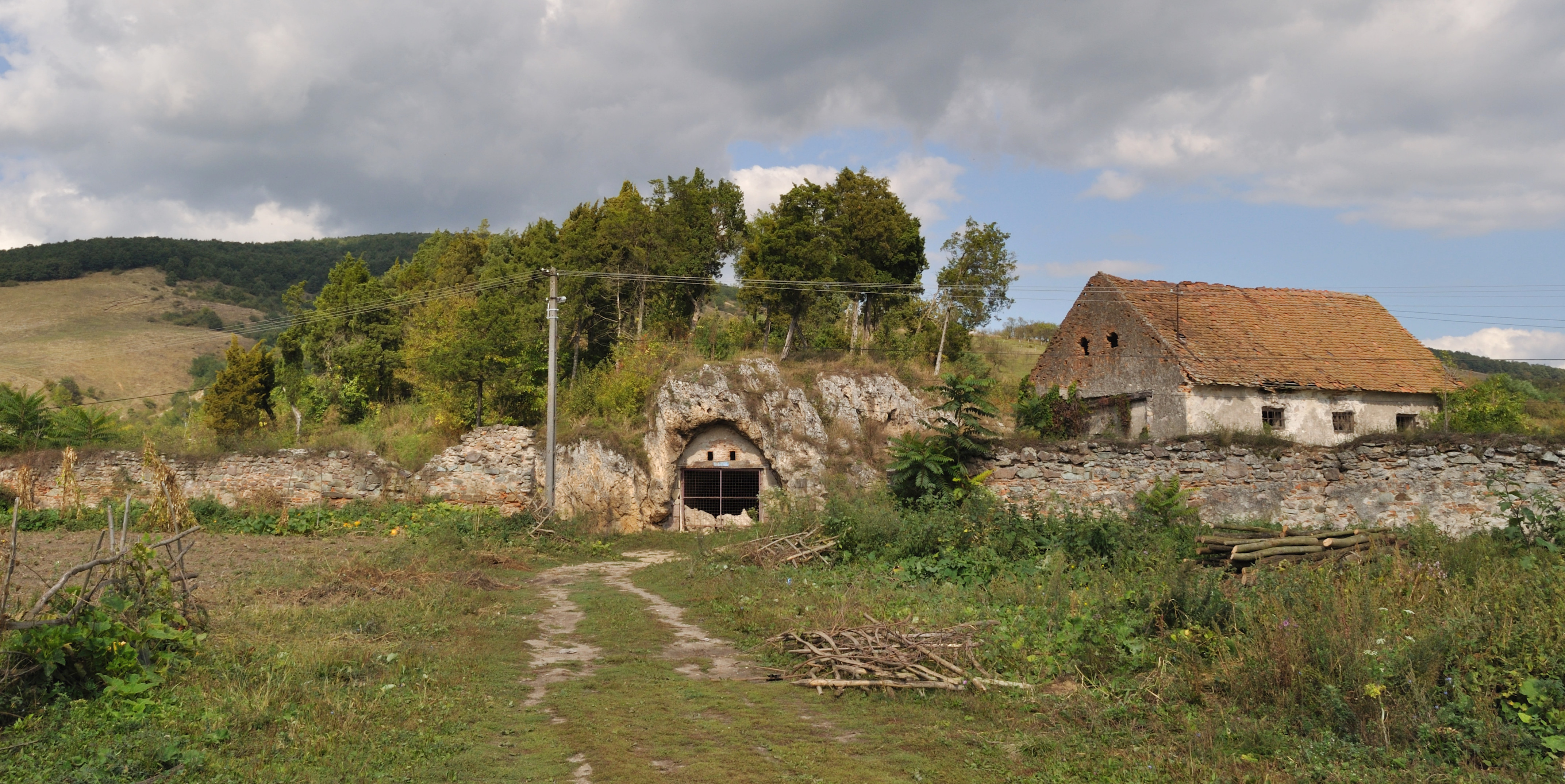 Ansamblul conacului Daniel, Rapoltu Mare, Hunedoara